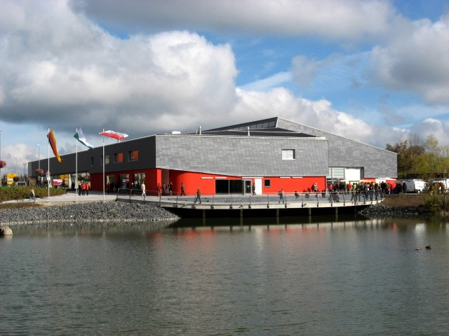 Die Eishalle in Ilmenau